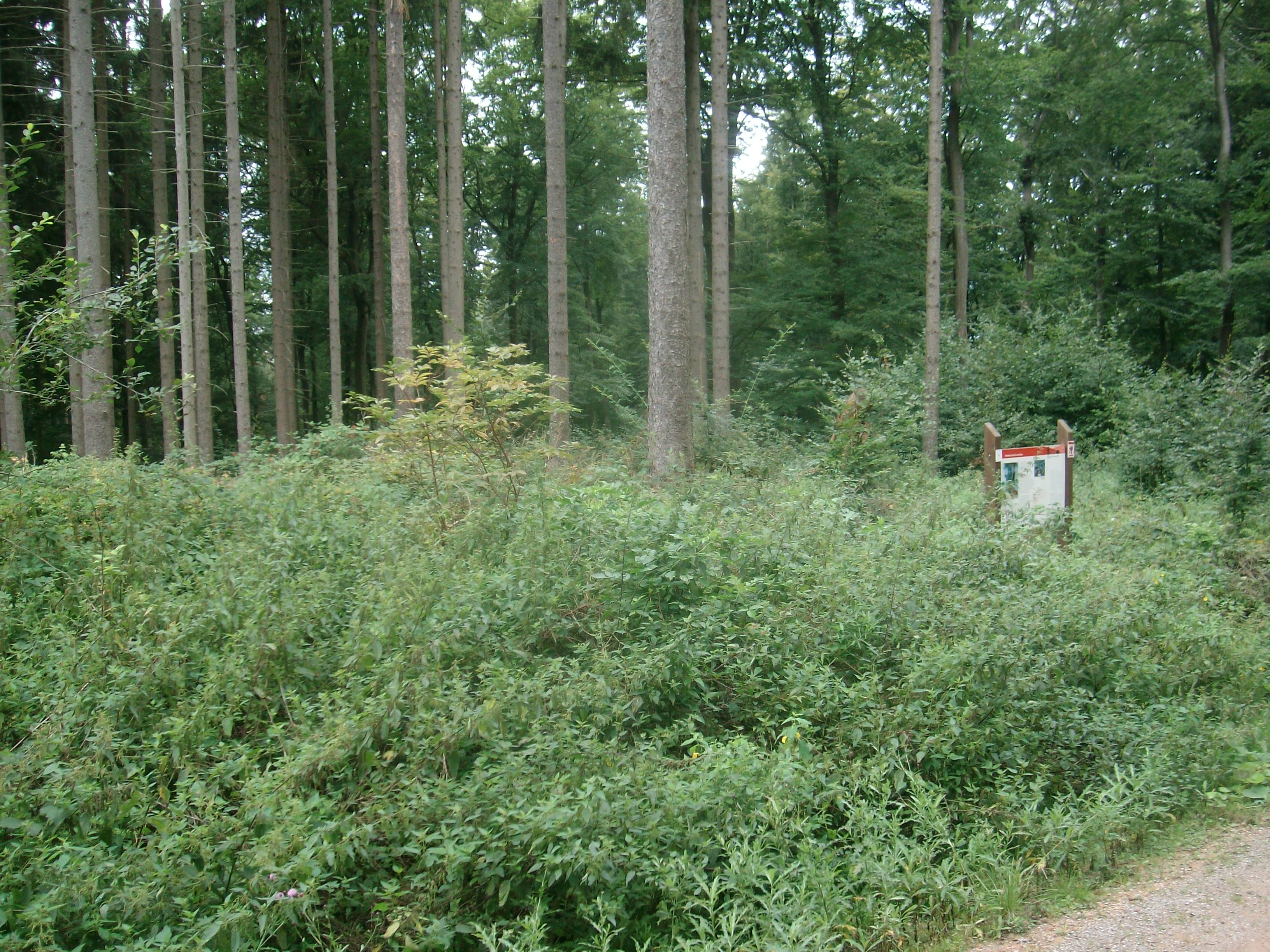 Wachposten 3/6 am Limes am Römerrundweg Hohenstein